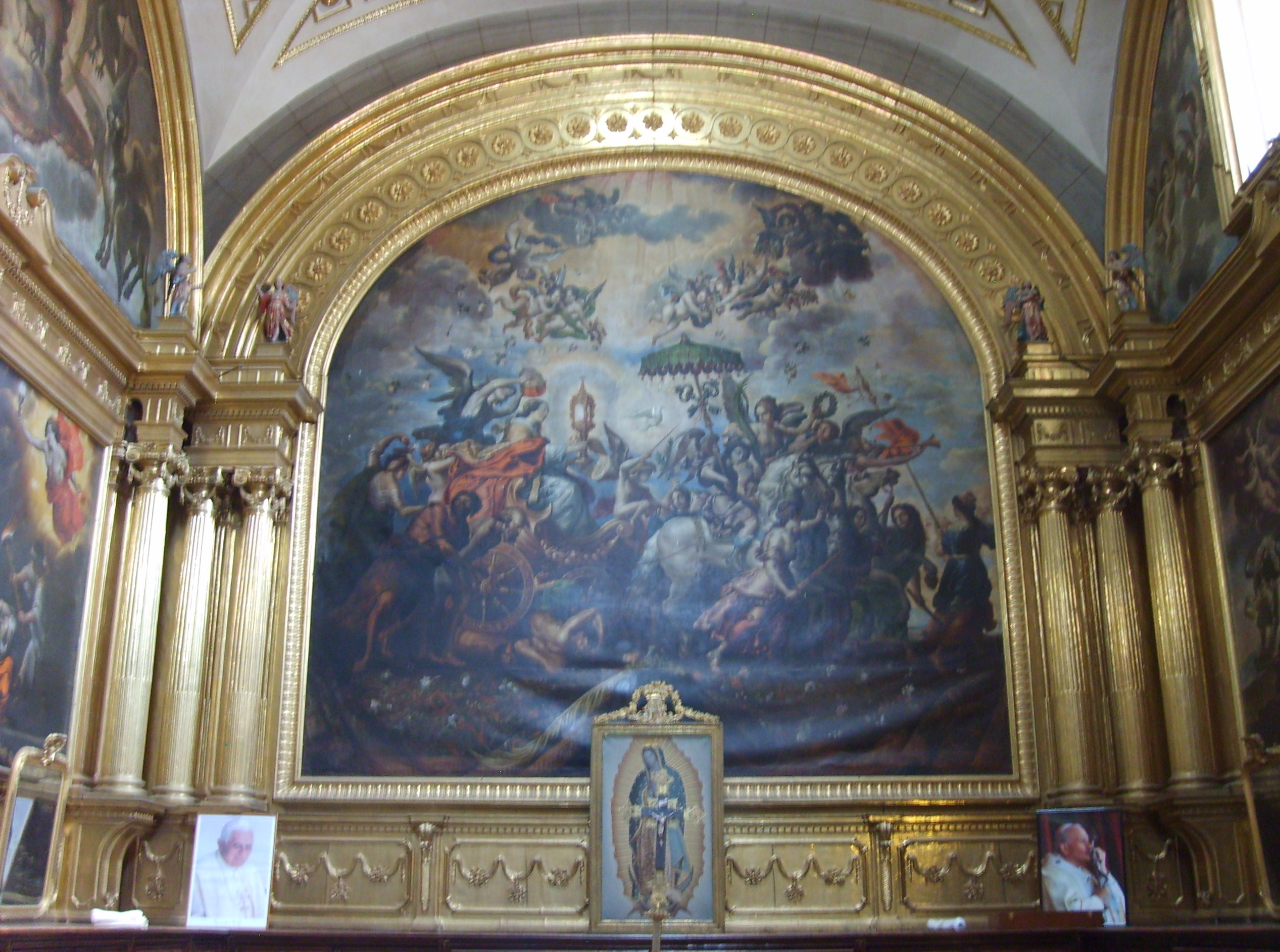 Pintura de la Sacristía de la Catedral de Puebla.